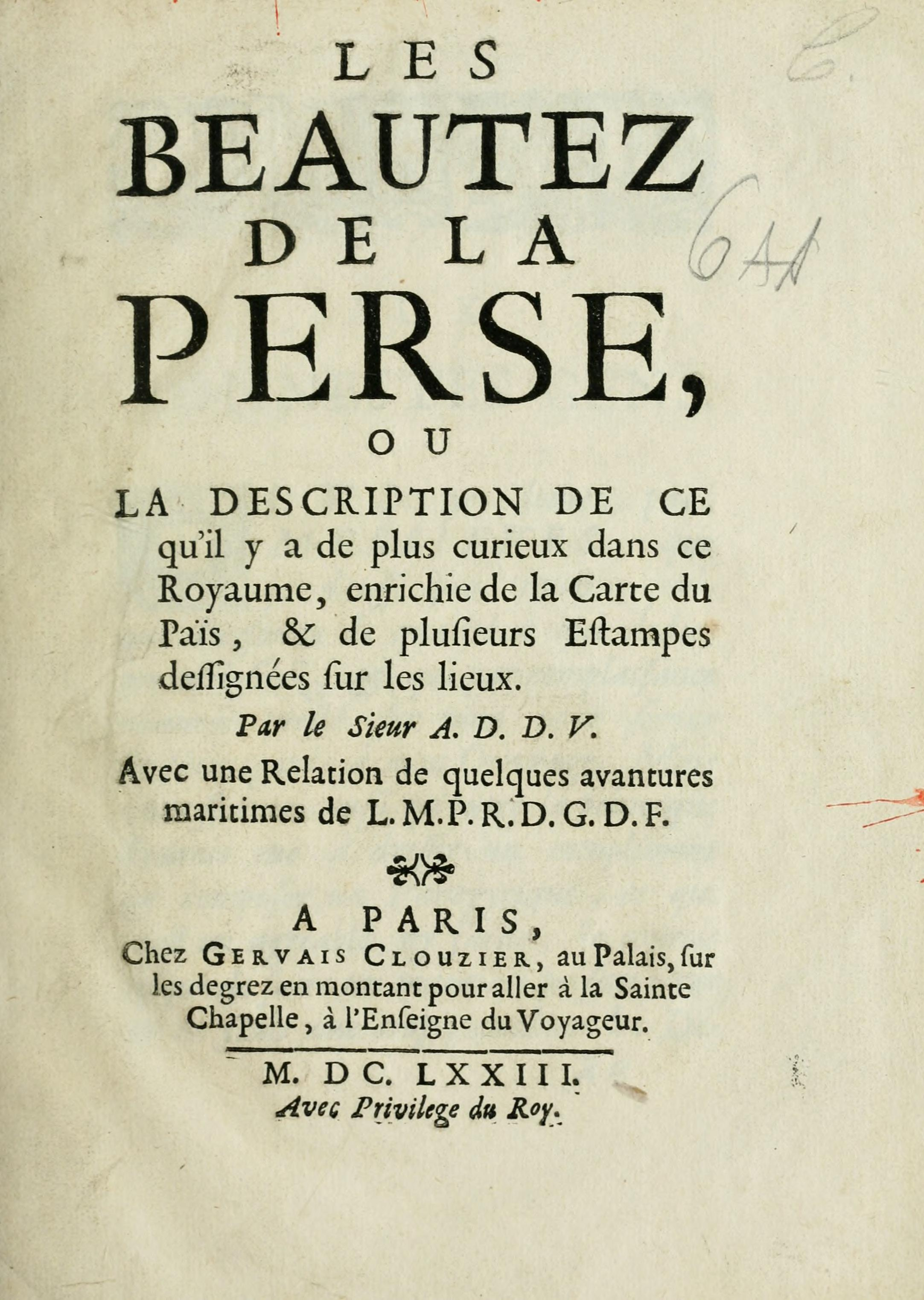 Page titre du livre : Les Beautez de la Perse, ou la Description de ce qu'il y a de plus curieux dans ce Royaume, enrichie de la Carte du Païs, & de plufieurs Eftampes deffignées fur les lieux. Avec une Relation de quelques avantures maritimes de L.M.P.R.D.G.D.F.